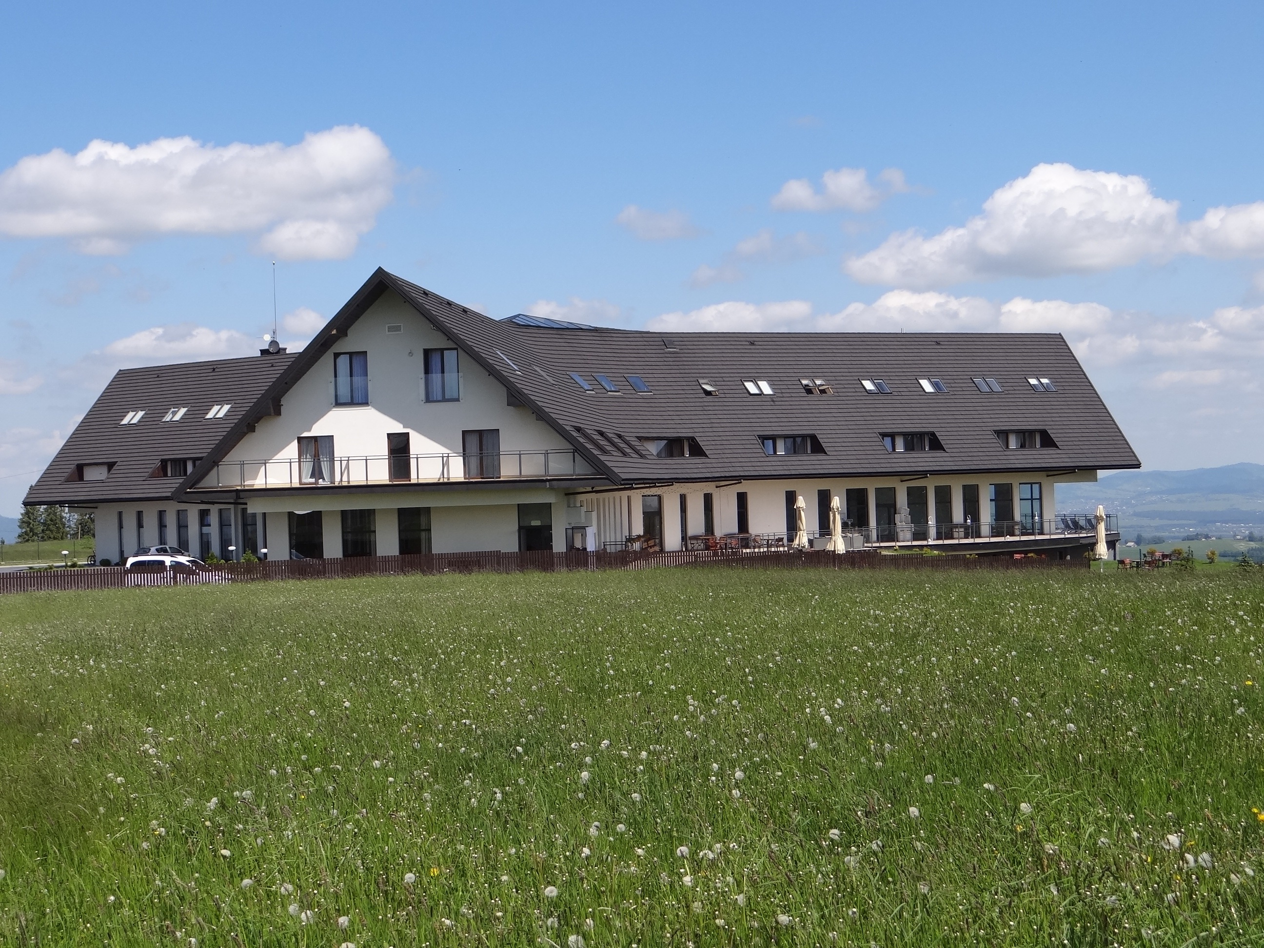 Czerwienne. Hotel